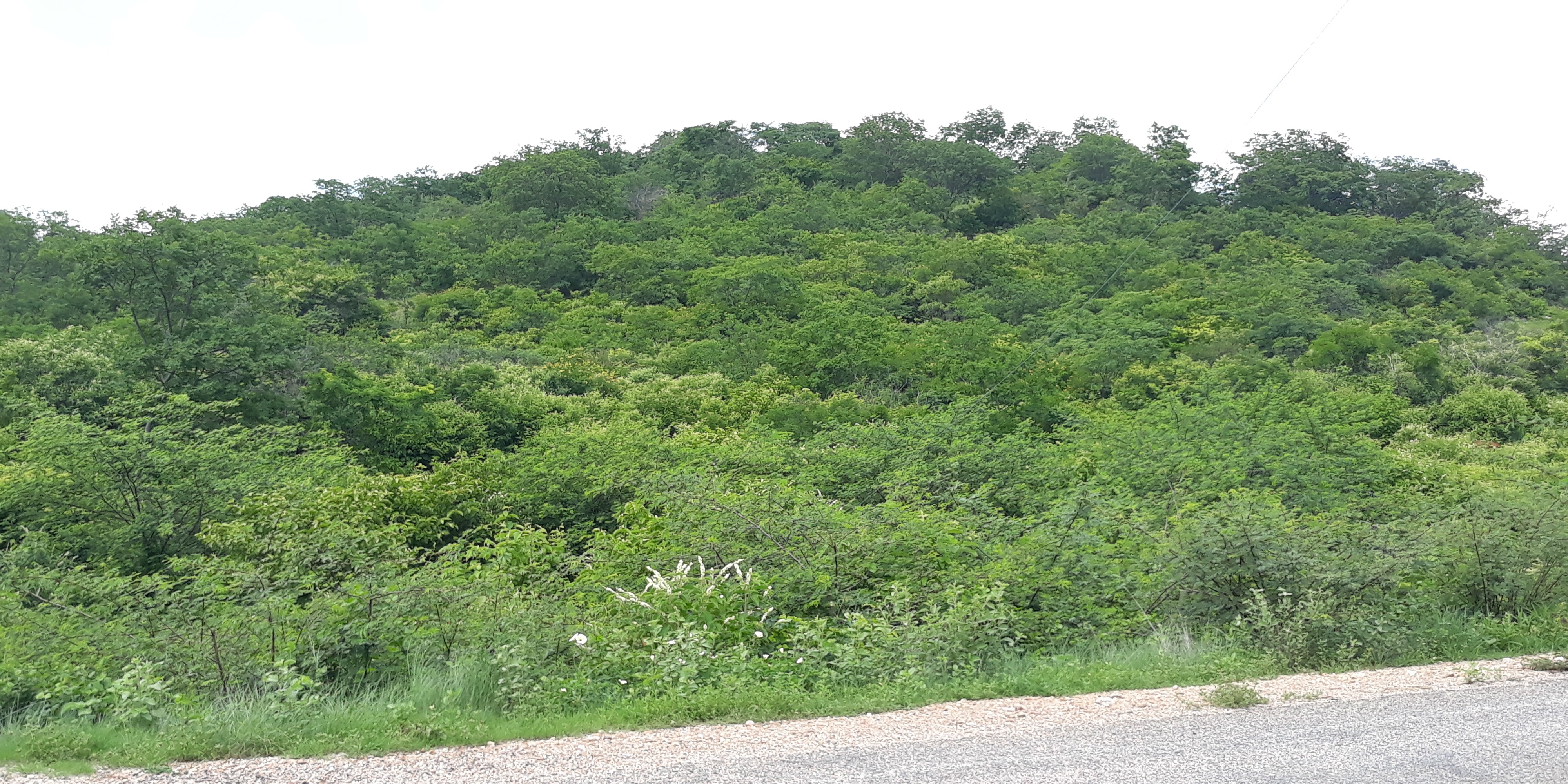 Caatinga hiperxerófila, vegetação típica do Sertão nordestino, durante o período chuvoso, no município de Almino Afonso, Rio Grande do Norte (Brasil)